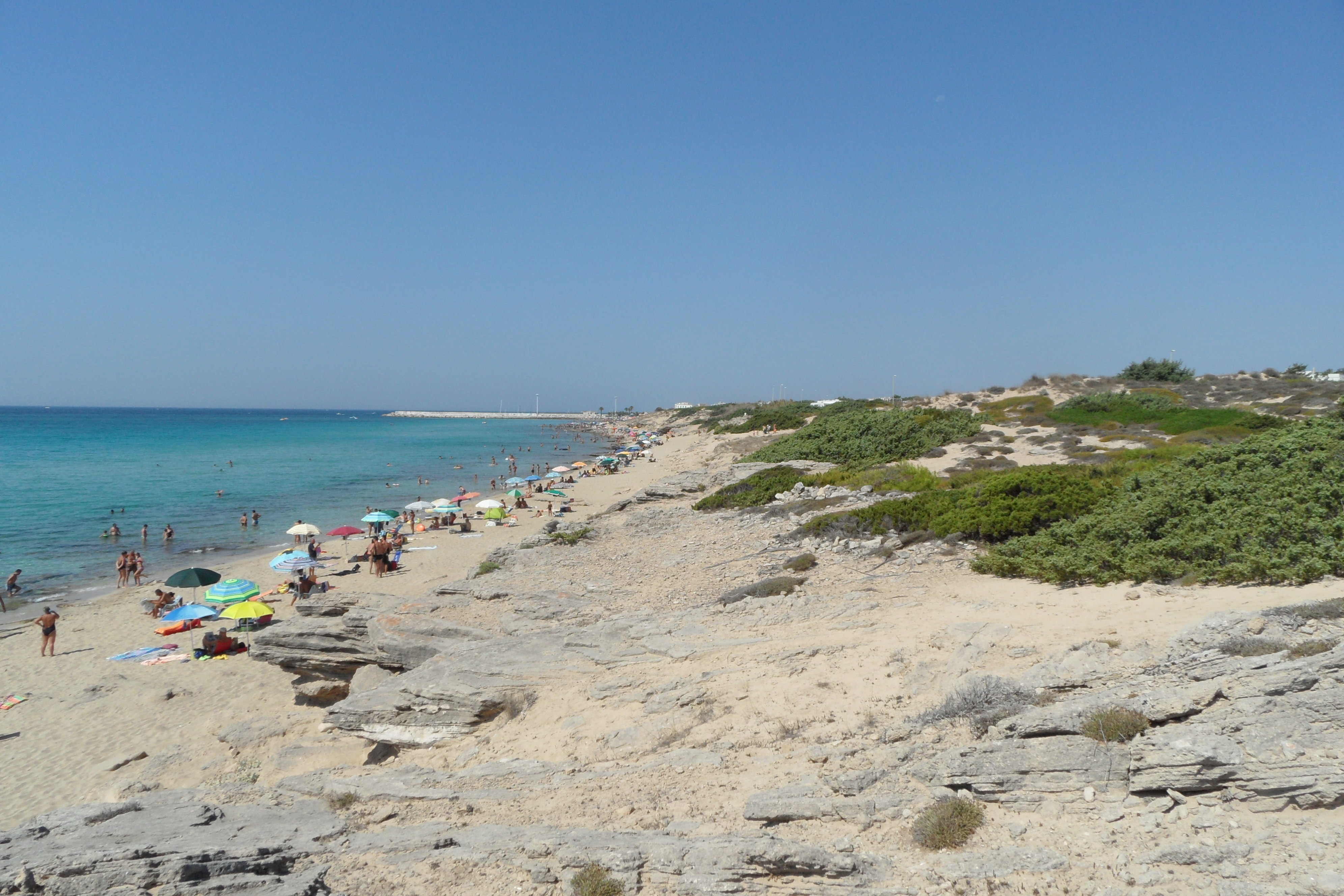 Campomarino, spiaggia